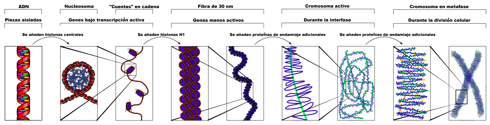 Traducción de la imagen File:Chromatin_Structures.png